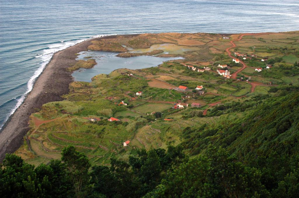 Esta atardeciendo y no había muy buena luz, pero no quería quedarme sin fotografiarla.